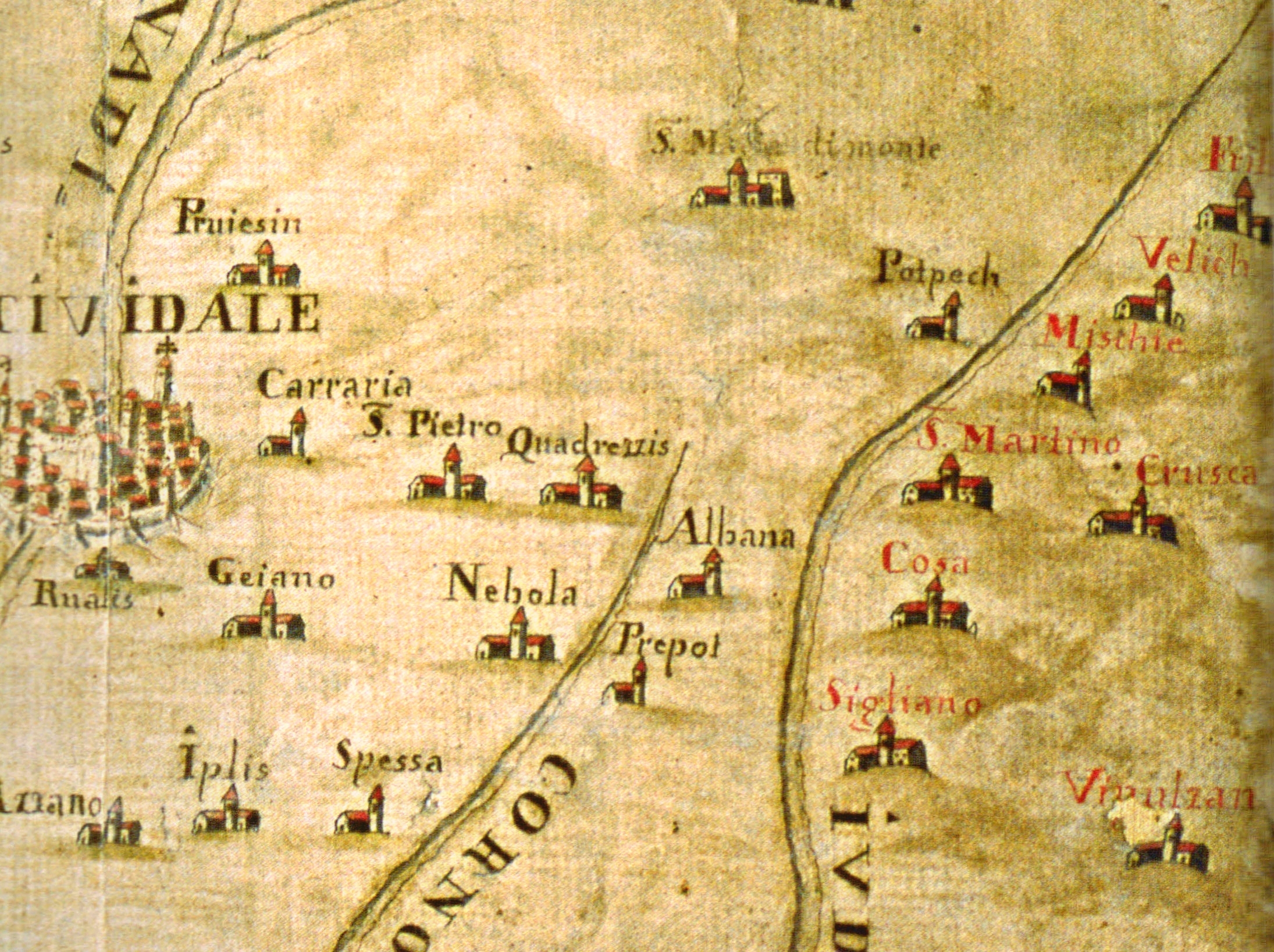 "Patria del Friuli" - Simone Vincenzutti 1733